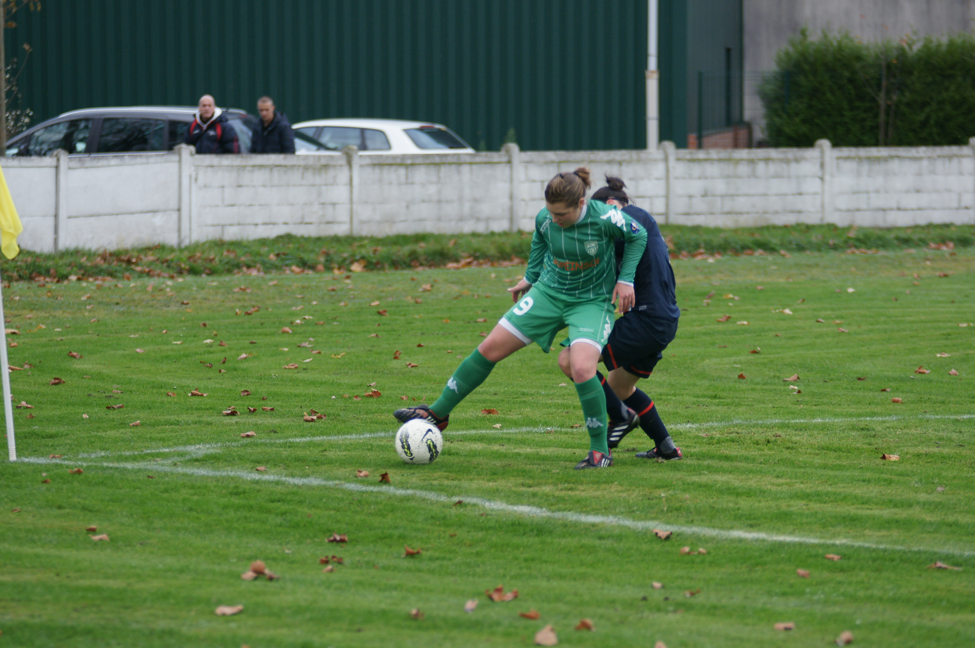 Photo du match FCF Hénin-PSG 2011/2012